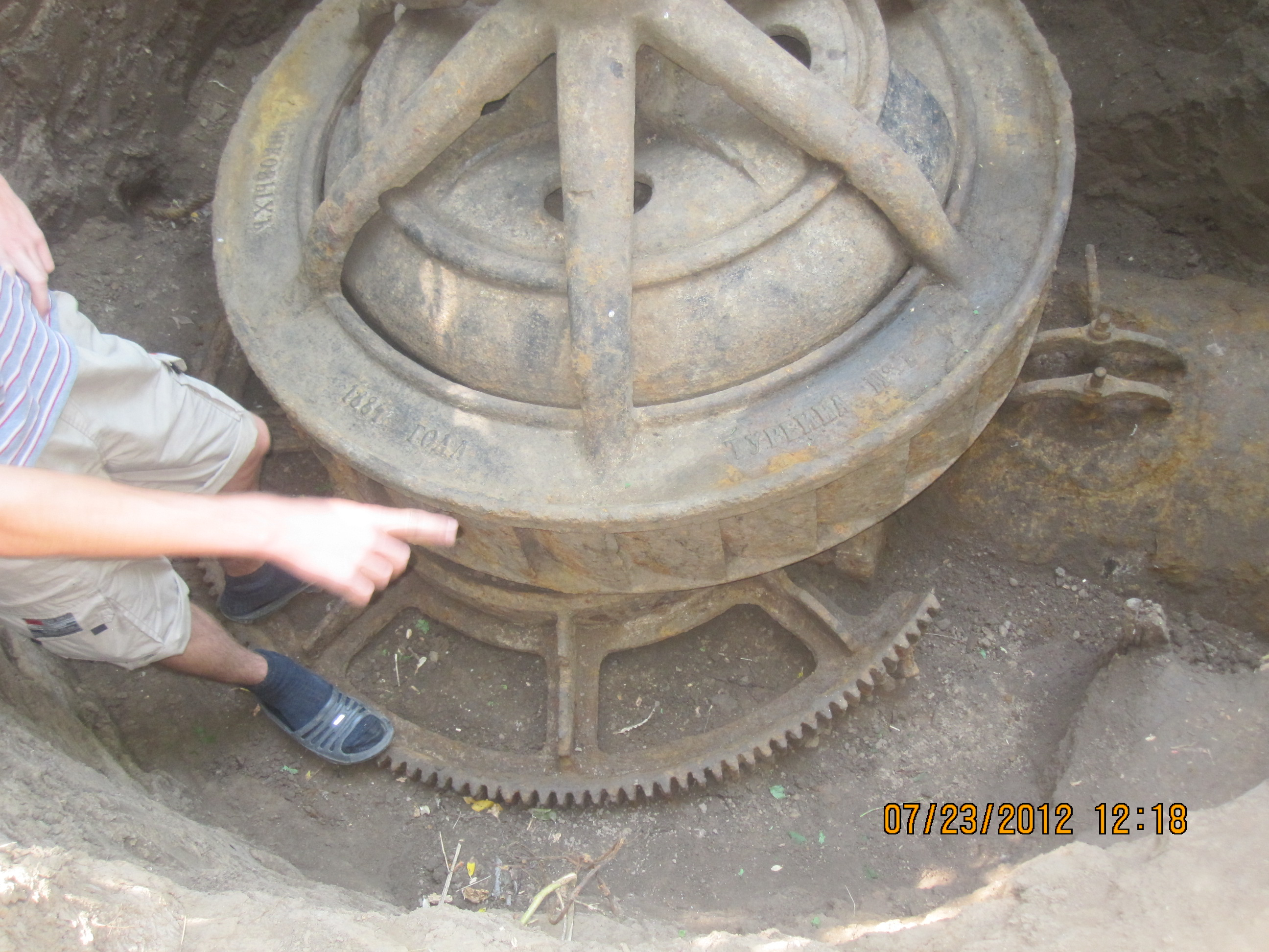 Муфта с валом «Турбина № 7» отлитая на Благовещенском заводе во времена руководства Дашковых 1884 года производства.